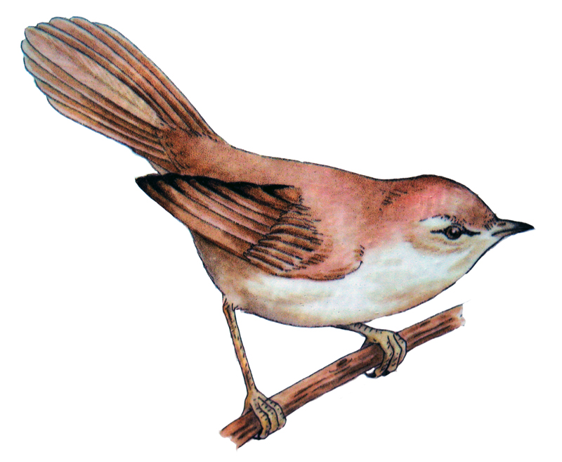 Luscinia megarhynchos.